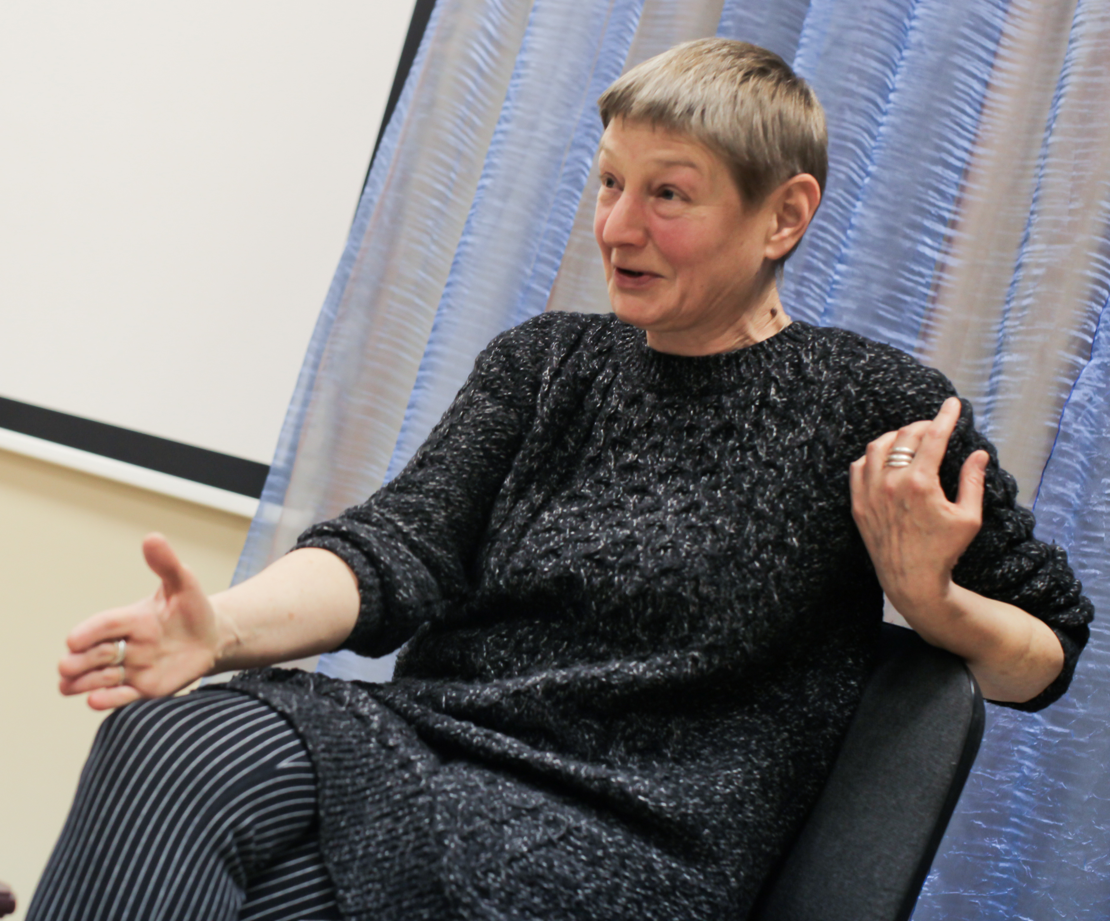 Актриса Екатерина Львовна Дурова ("Библионочь-2016" в библиотеке им. М.Ю.Лермонтова, Москва)